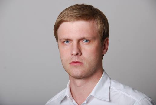 Лунченко Валерій Валерійович, Україна